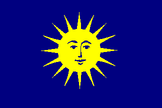 Zonhoven.